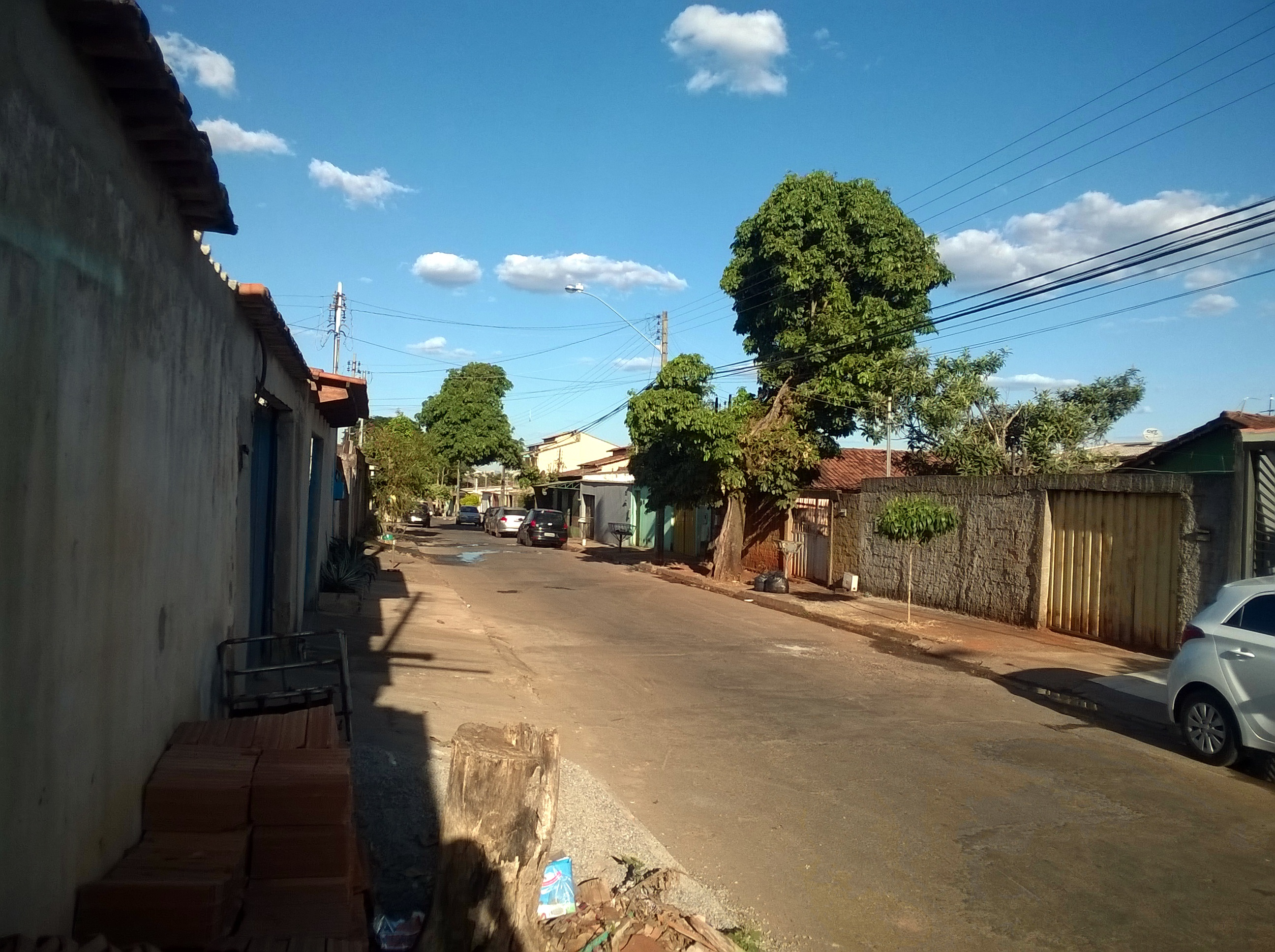 Rua VF-27, no bairro Finsocial, na cidade brasileira de Goiânia. A imagem foi fotografada dia 12 de julho de 2015.